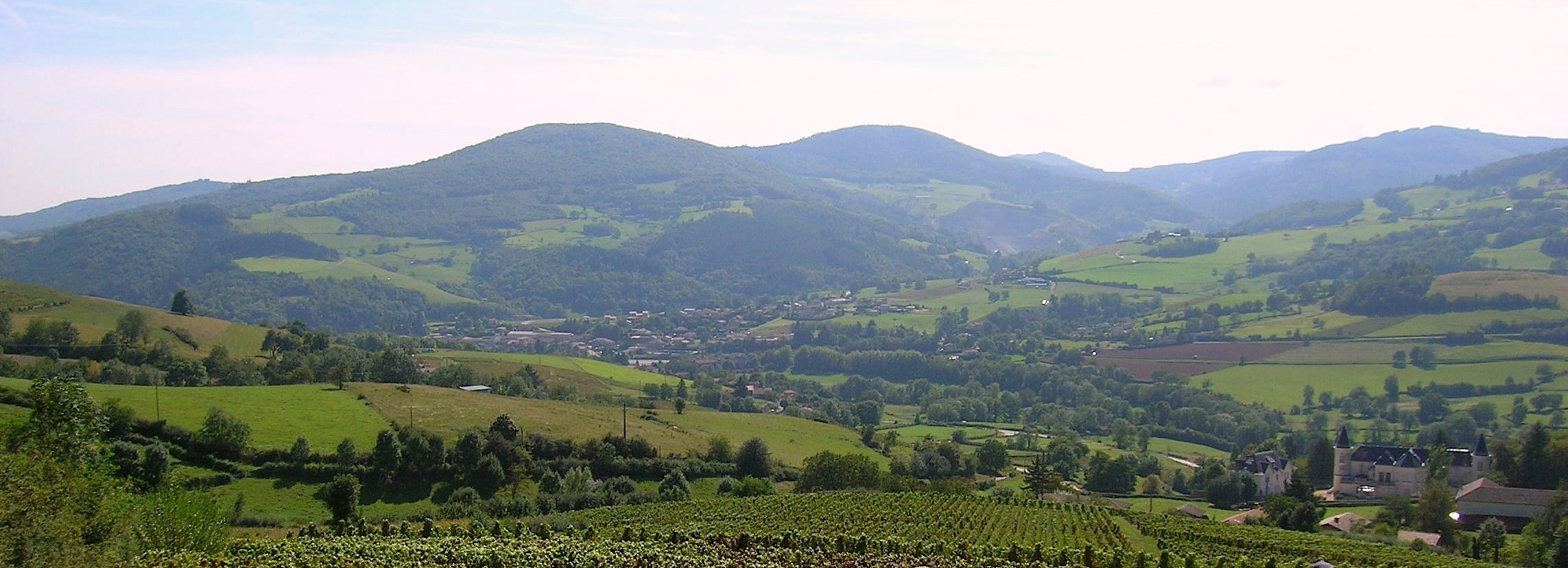 panorama de Saint-Didier-sur-Beaujeu, sur la droite le château des Ardillats, Rhône, France.